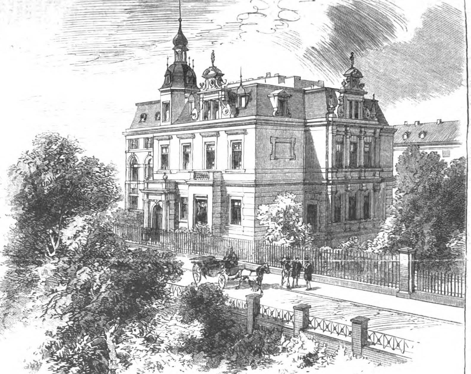 Wohnhaus und Atelier des Malers Carl Gussow (1843-1907) in Berlin-Tiergarten, Kielgan-Viertel, Buchenstraße 2; erbaut 1881-1882 nach Entwurf der Berliner Architekten Heinrich Kayser und Karl von Großheim; zerstört